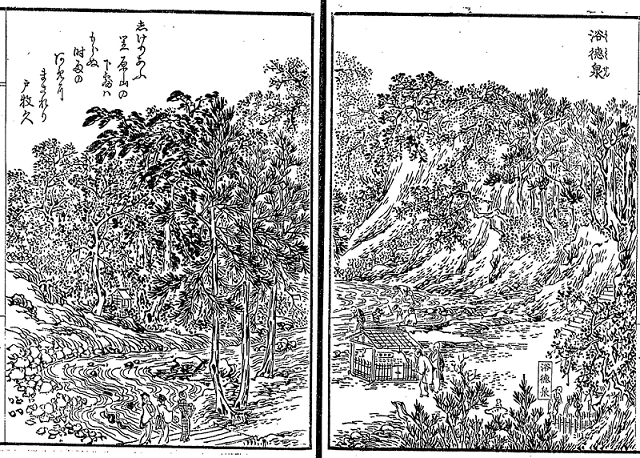 笠原水道、浴徳泉の図(『茨城常盤公園攬勝図誌』松平俊雄 著 YDM23693 (マイクロフィッシュ) )コマ番号99 改編 [ 国立国会図書館デジタルコレクション:インターネット公開（保護期間満了）